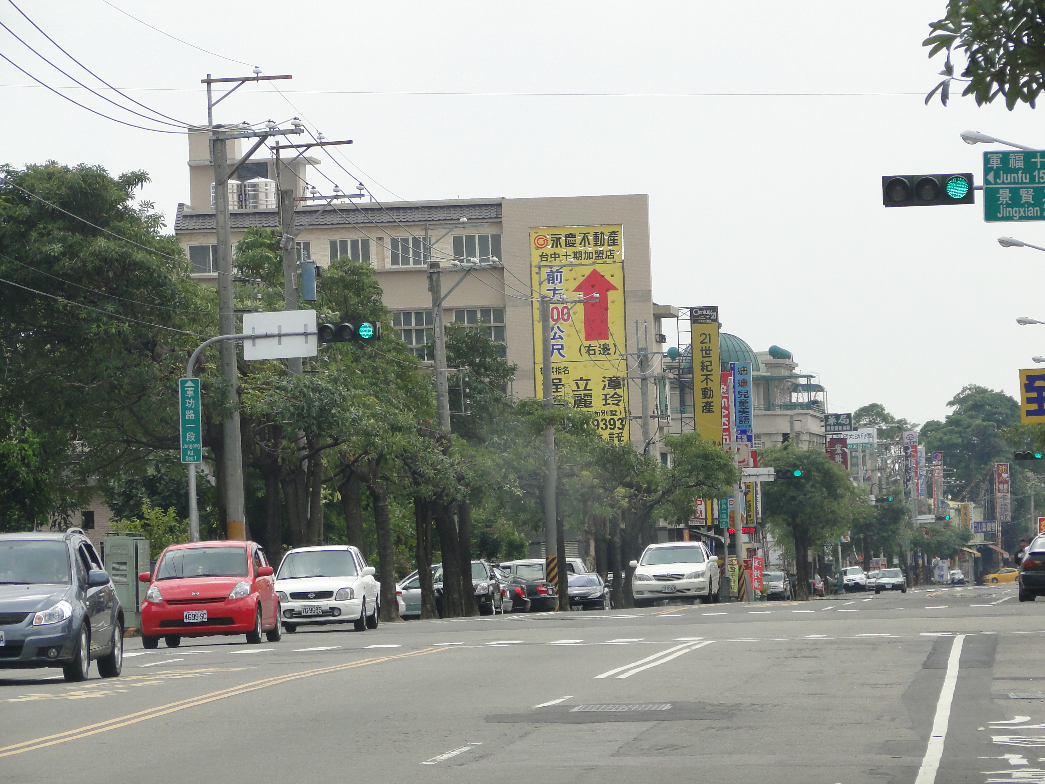 中文（台灣）: 台灣台中市軍功路一段一景。